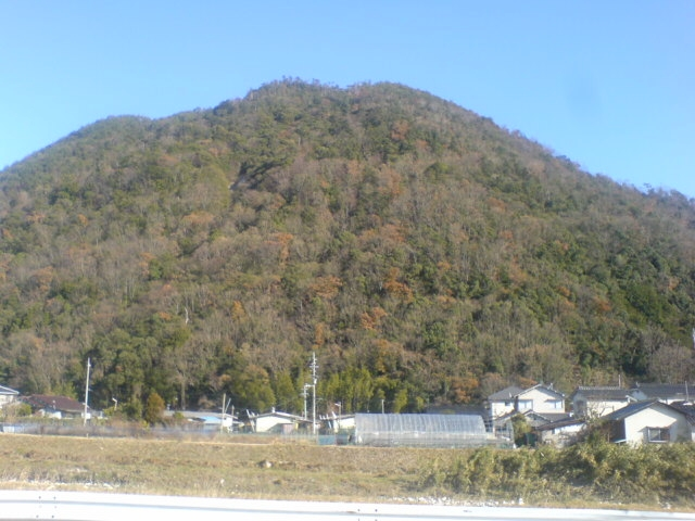 Miiritakamatsu castle mountain in Asakita-ku, Hiroshima, Hiroshima, Japan